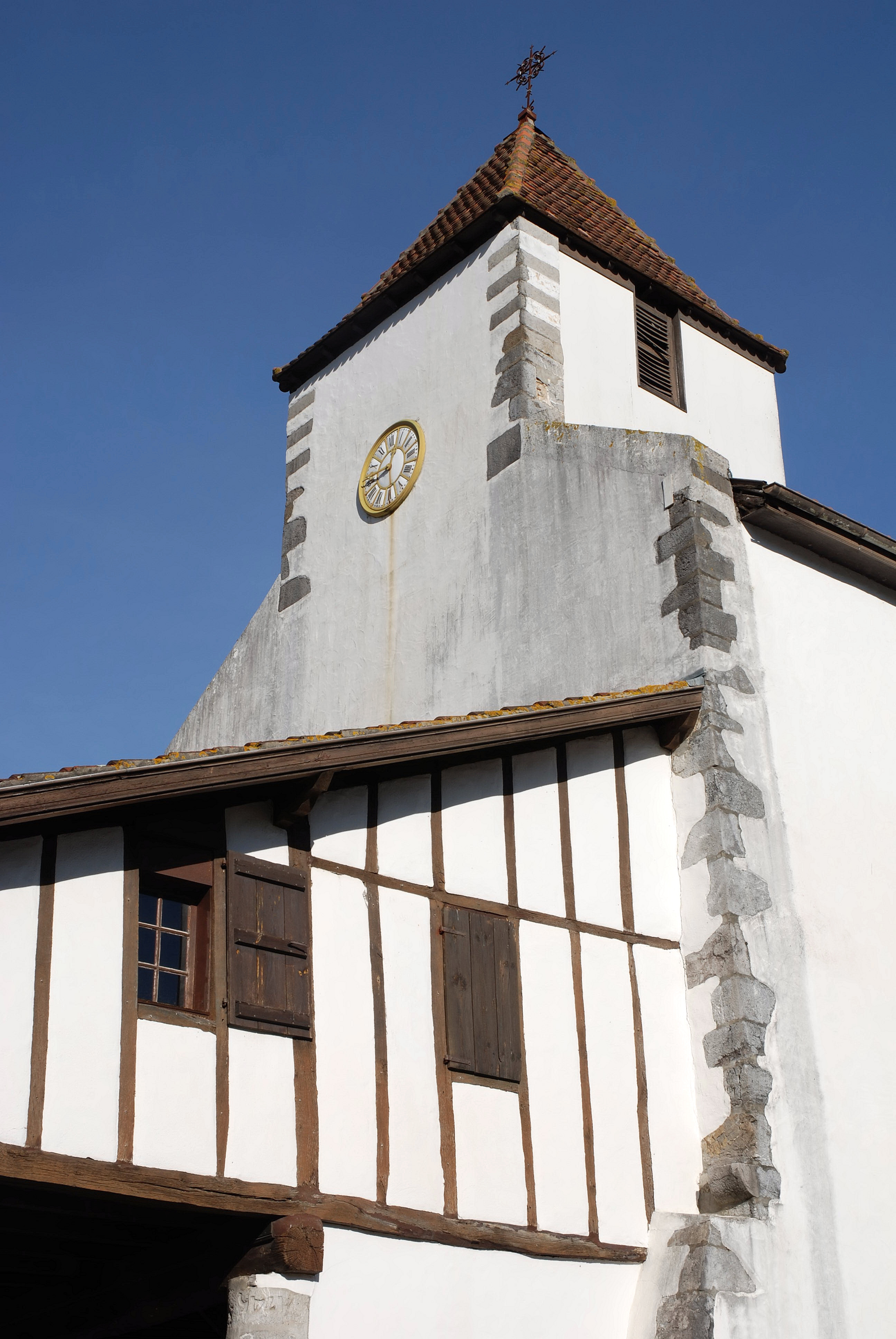 Hasparren, dans le quartier d'Urcuray, l'église Saint-Joseph. Photo prise le 31/12/06 par Harrieta171